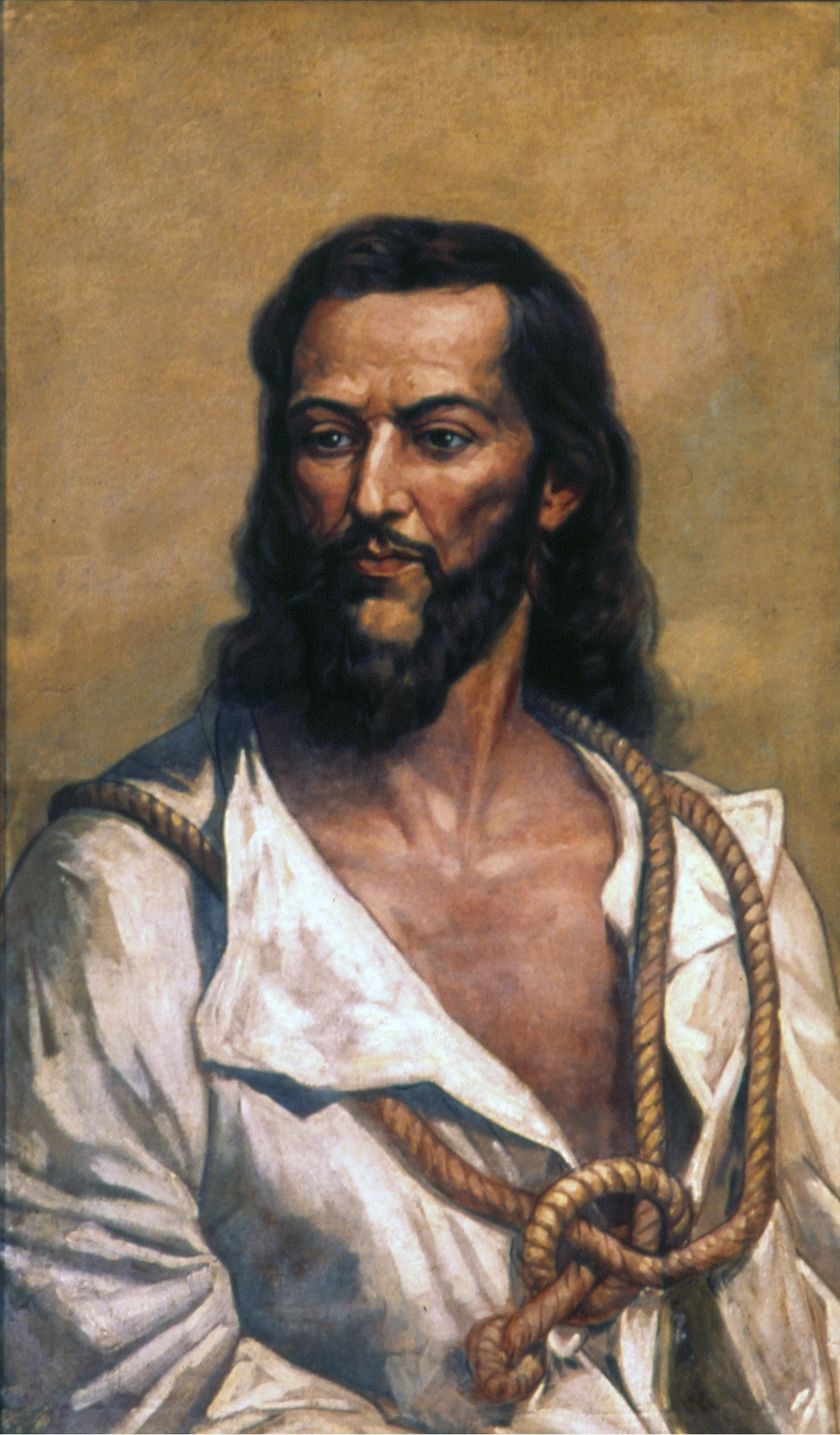 Obra que integra o acervo do Museu Paulista da USP. Coleção Fundo Museu Paulista - FMP